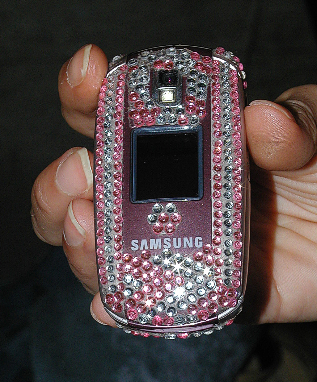 Ein Samsung Handy von der ital. Besitzerin mit Strass besetzt (selbstgemacht)